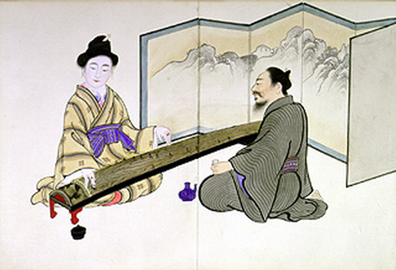 王府時代の国王から一般庶民までの姿